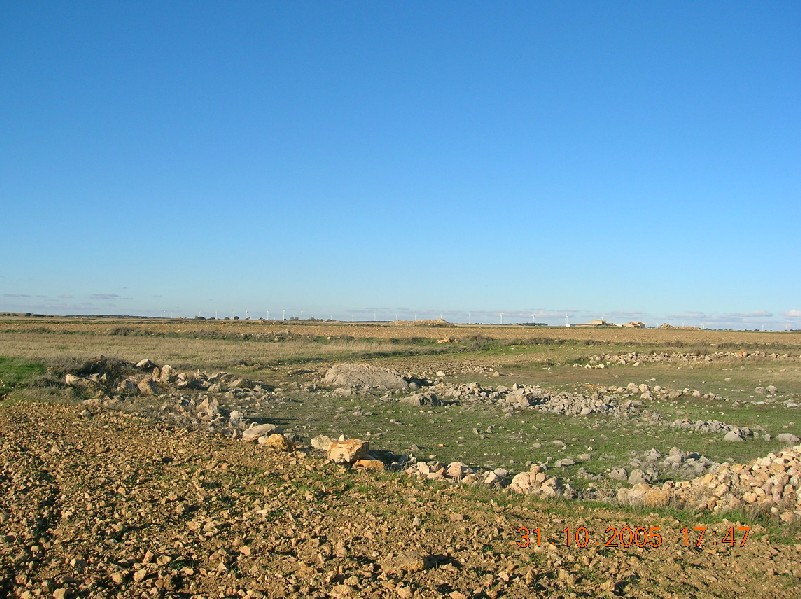 Paisaje de los navajos pedregosos del Campo de Montiel (periodo seco)